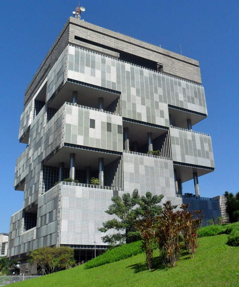 Petrobras headquarters in Rio de Janeiro